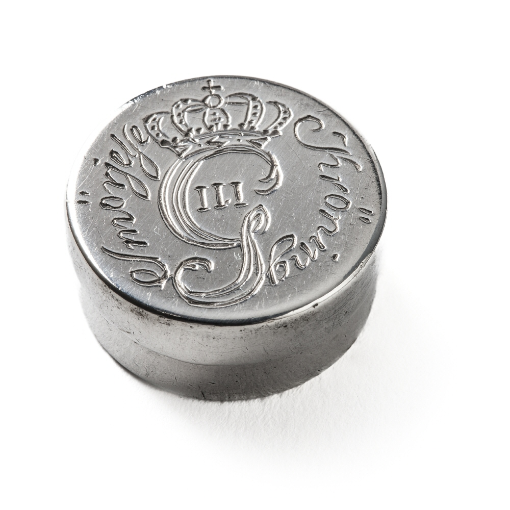 Balsamdosa från Gustav III:s kröning 1772-05-29 i Storkyrkan, Stockholm. Rund dosa av silver med påträtt, 5 mm högt, löst lock. På locket graverat Gustav III:s krönta namnchiffer samt däromkring med skrivstil: "Kröning Smörjelse". Dosan invändigt förgylld. Balsamet som en gång låg i dosan blandades till av hovapotekaren. Det innehöll lavendel och rosor, och var rödfärgat och till konsistensen något mer trögflytande än olja. Under kröningsceremonin strök ärkebiskopen balsamet på kungens kropp, som då fick Guds välsignelse. I Livrustkammaren, inventarienummer 24378 (79:1)